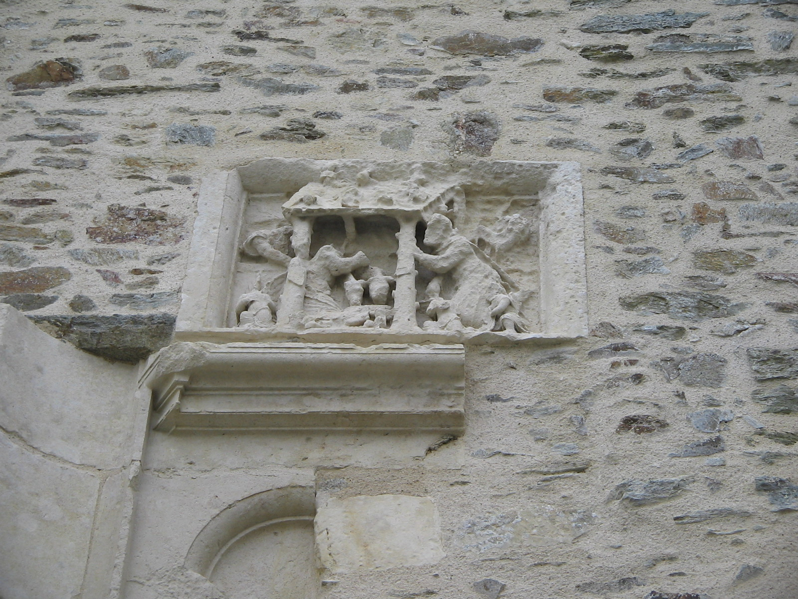 un détail sur l'église de Fenioux (79) en septembre 2011